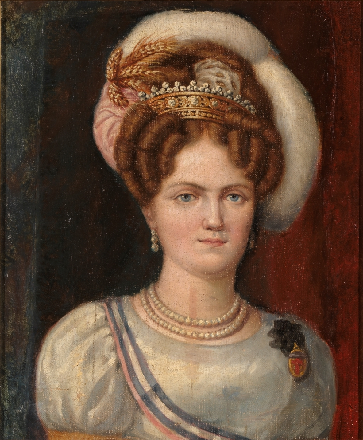 Fragmento de Desembarco de Fernando VII en el Puerto de Santa María (Cádiz) con el retrato de María Josefa Amalia de Sajonia, reina consorte de España, ostentando la banda de la Orden de María Luisa y de la Orden del Águila y la condecoración de la Estrella de María Teresa de Austria.